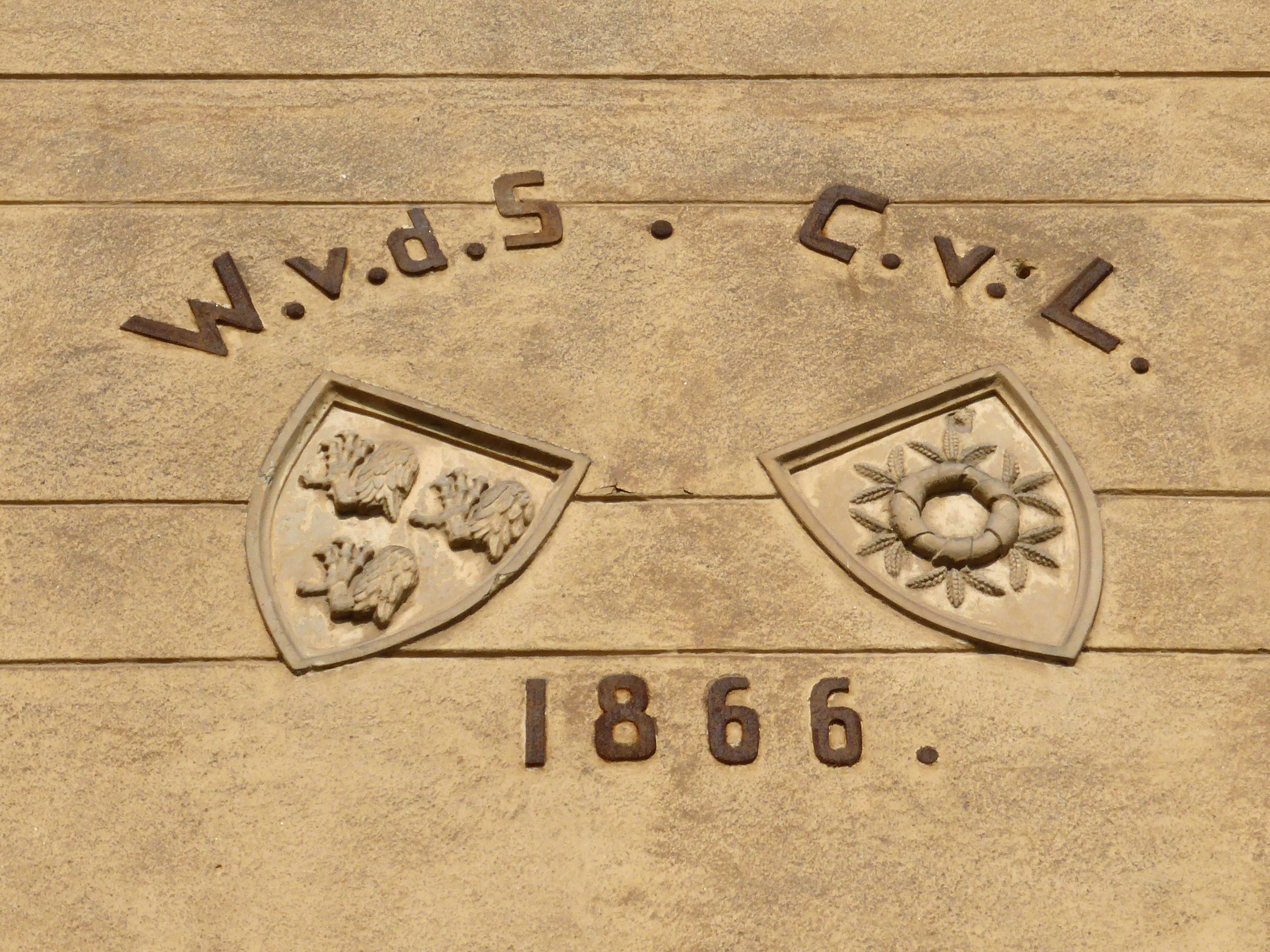 Inschrift an der Südfassade des Apenburger Hofes in Beetzendor von Wilhelm von der Schulenburg (1806-1883) und seiner Frau Clara geborene von Lattorff (1819-1890).